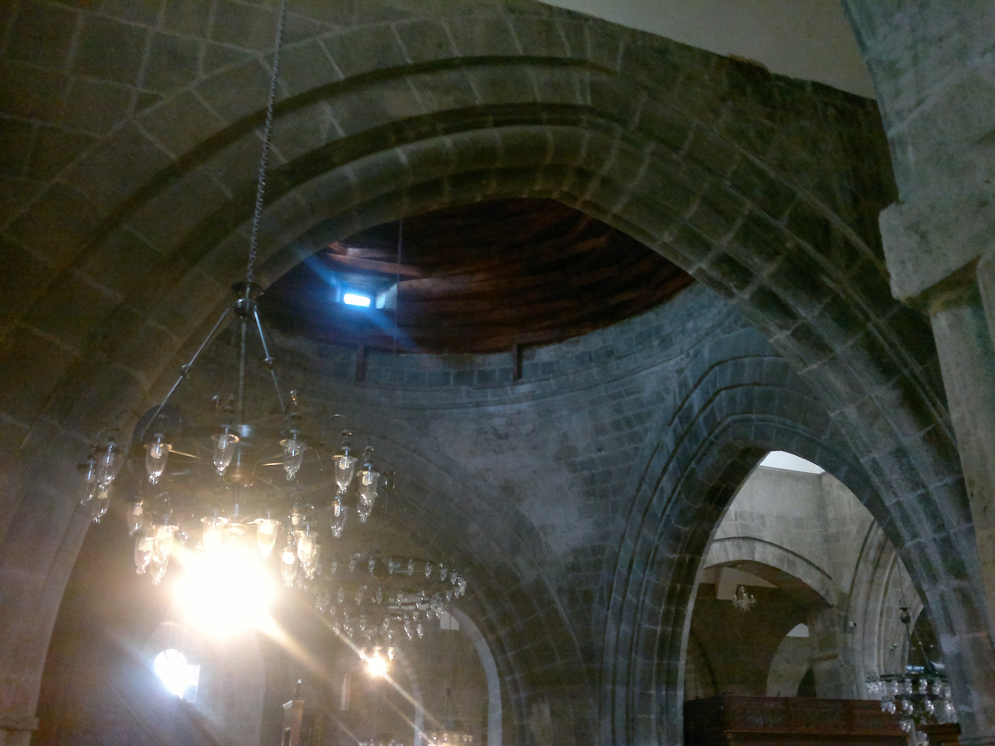 Erzurum Ulu Camii iç görünüm